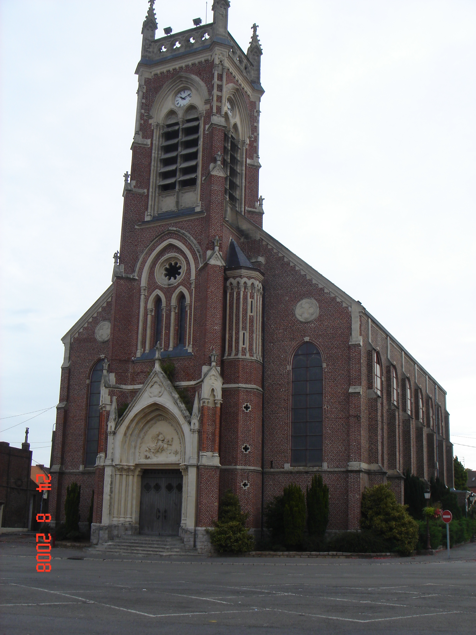 Église Saint-Martin d'Aniche (59) France